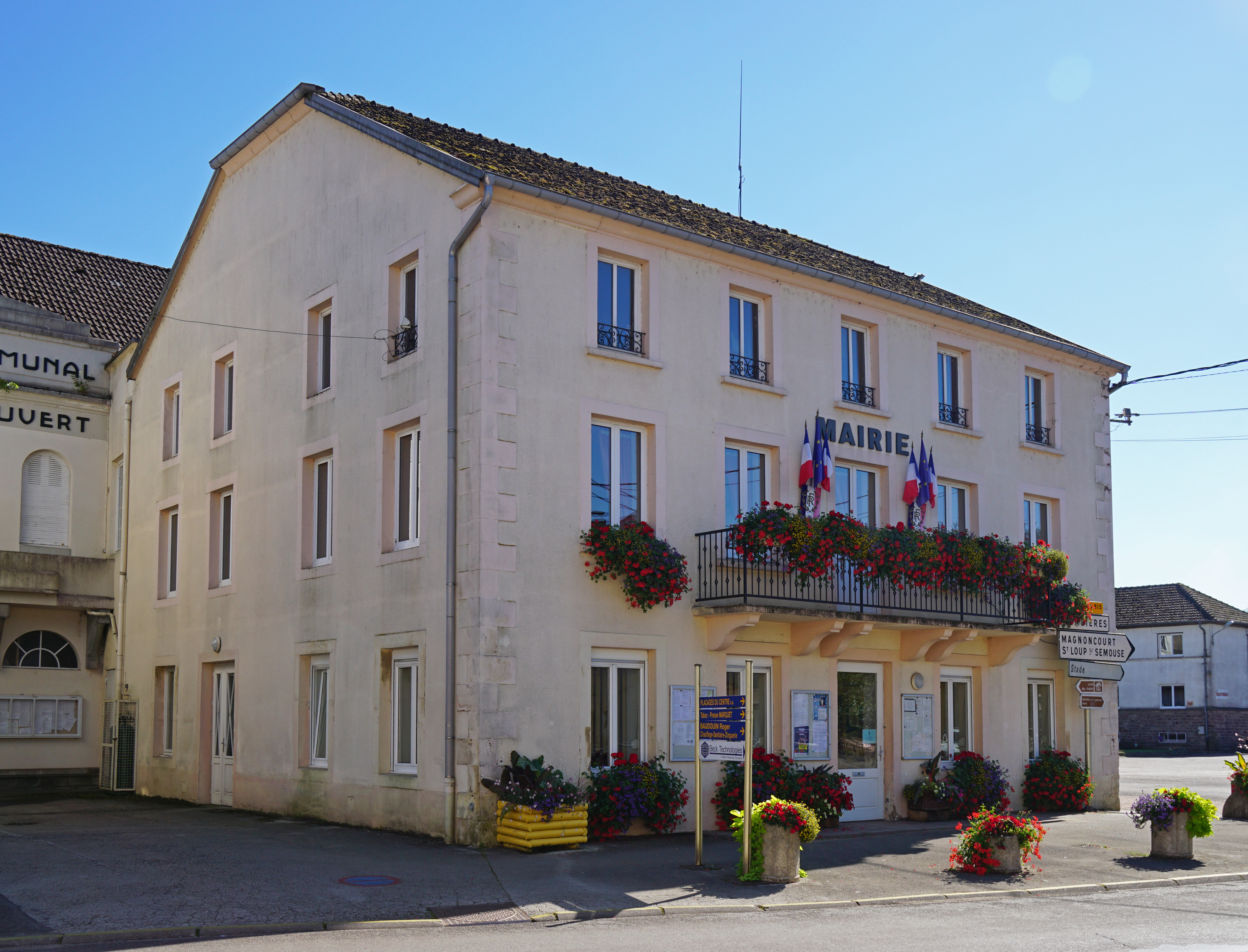 La mairie de Aillevillers-et-Lyaumont.